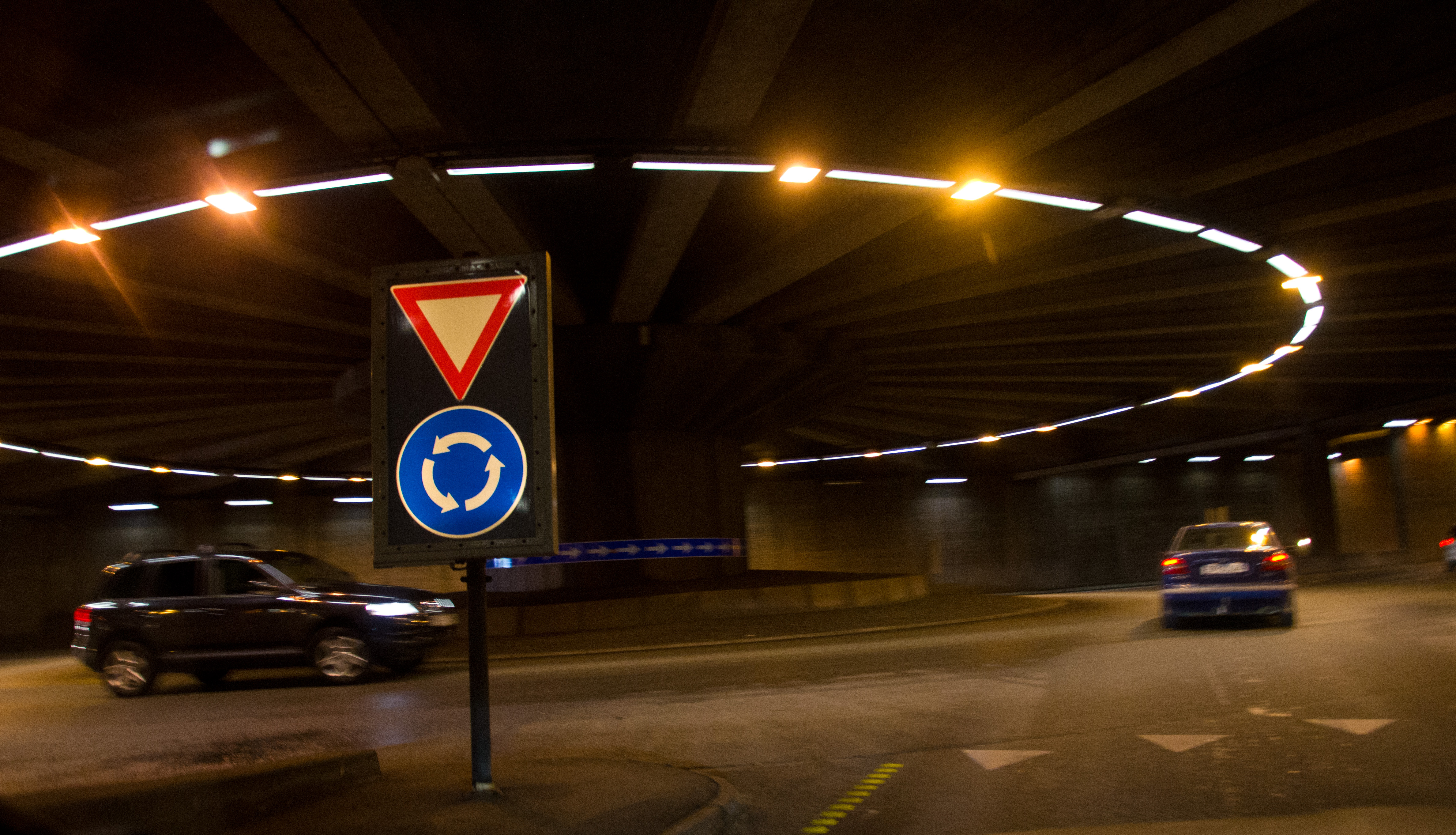 Vesttunnelen ved Sandvika